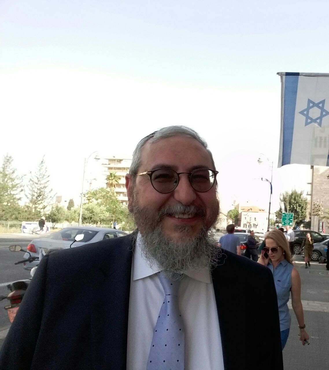 הרב חיים אמסלם בחודש אייר תשע"ז בירושלים